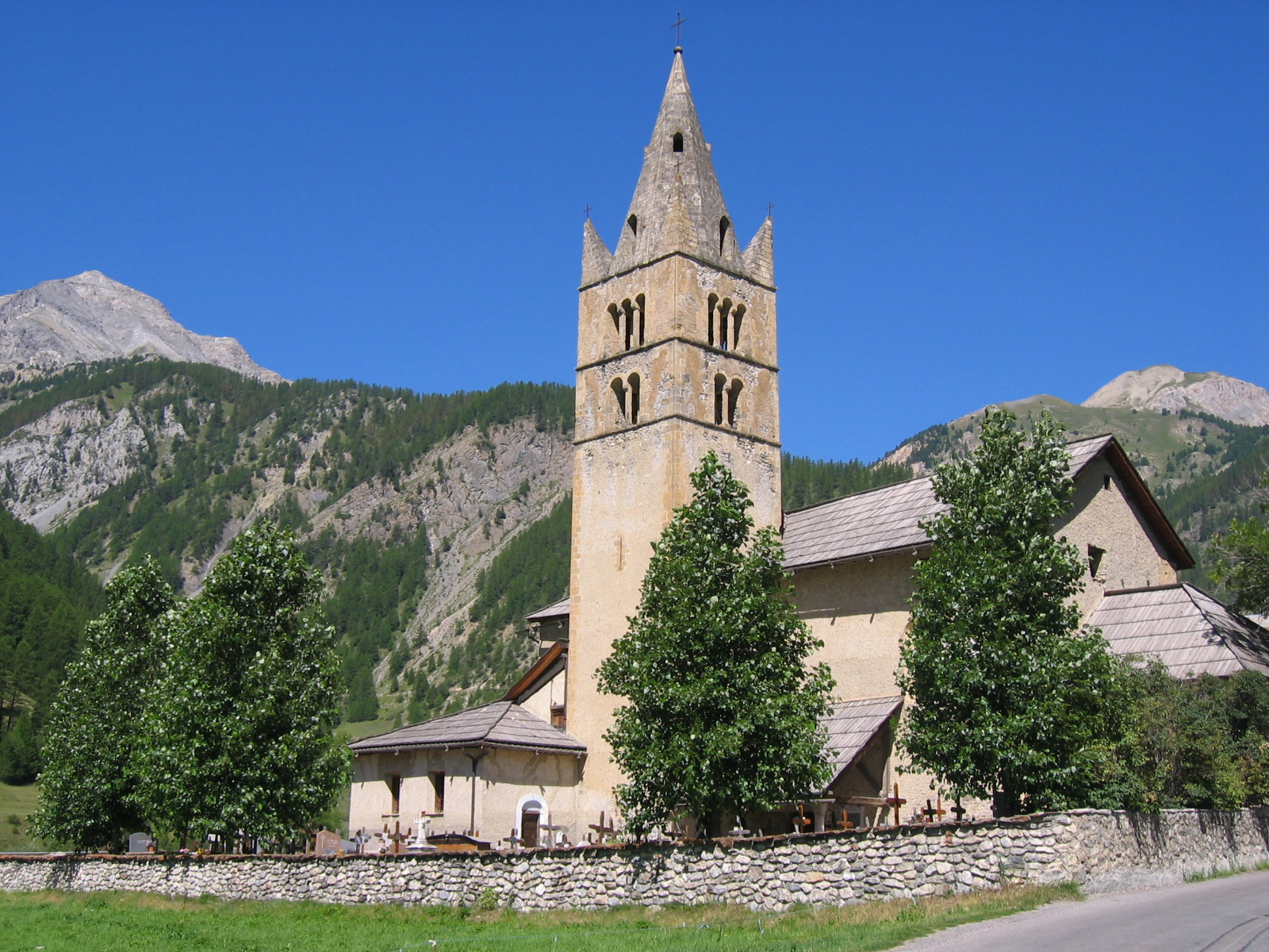 Queyras. Eglise Saint-Laurent, Arvieux, Hautes-Alpes, France